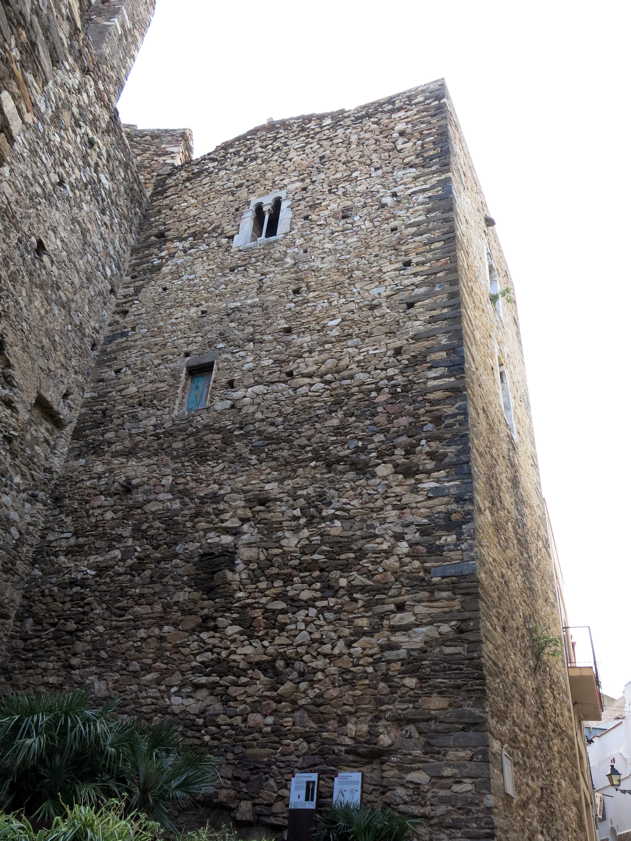 Torre (Llançà)